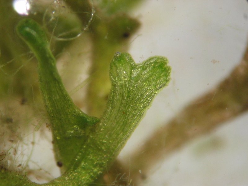 Untergetauchtes Sternlebermoos (Riccia fluitans), etwa 30x vergrößert